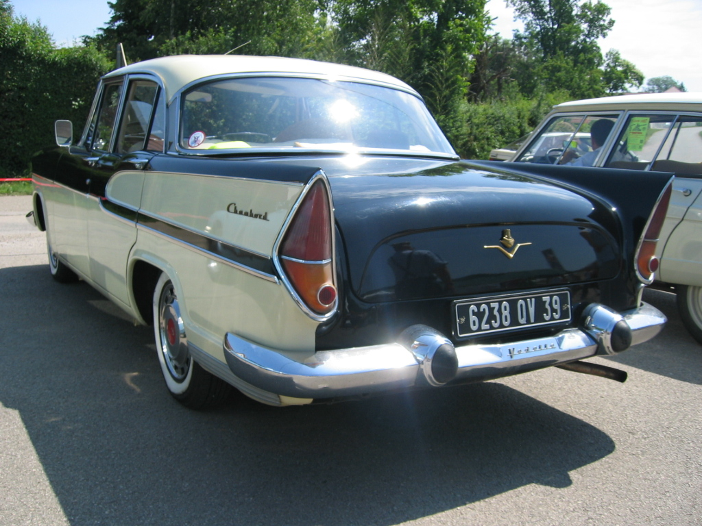 Simca Chambord